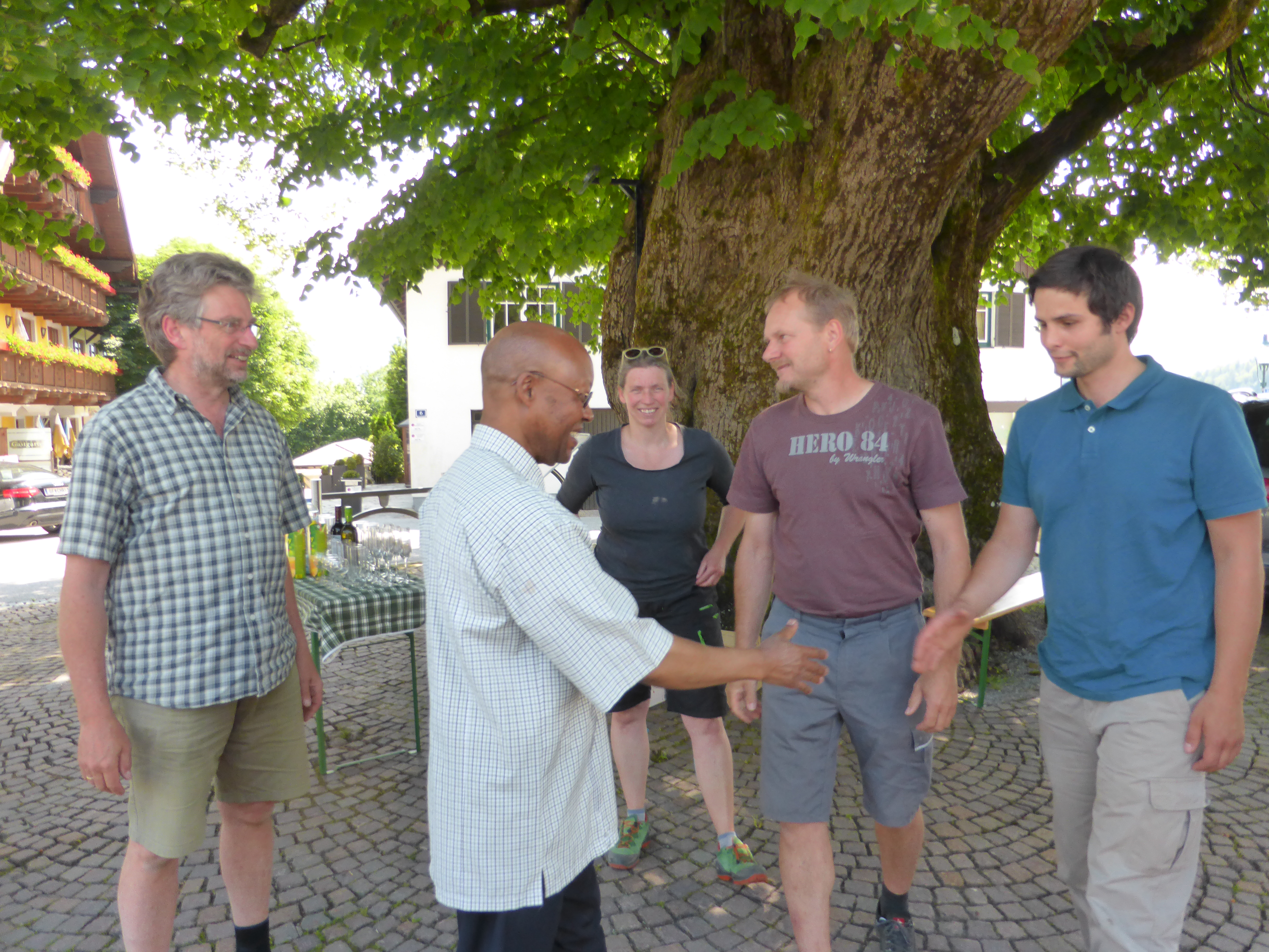 5. Juni 2018 Eintreffen der Linder-Orgel